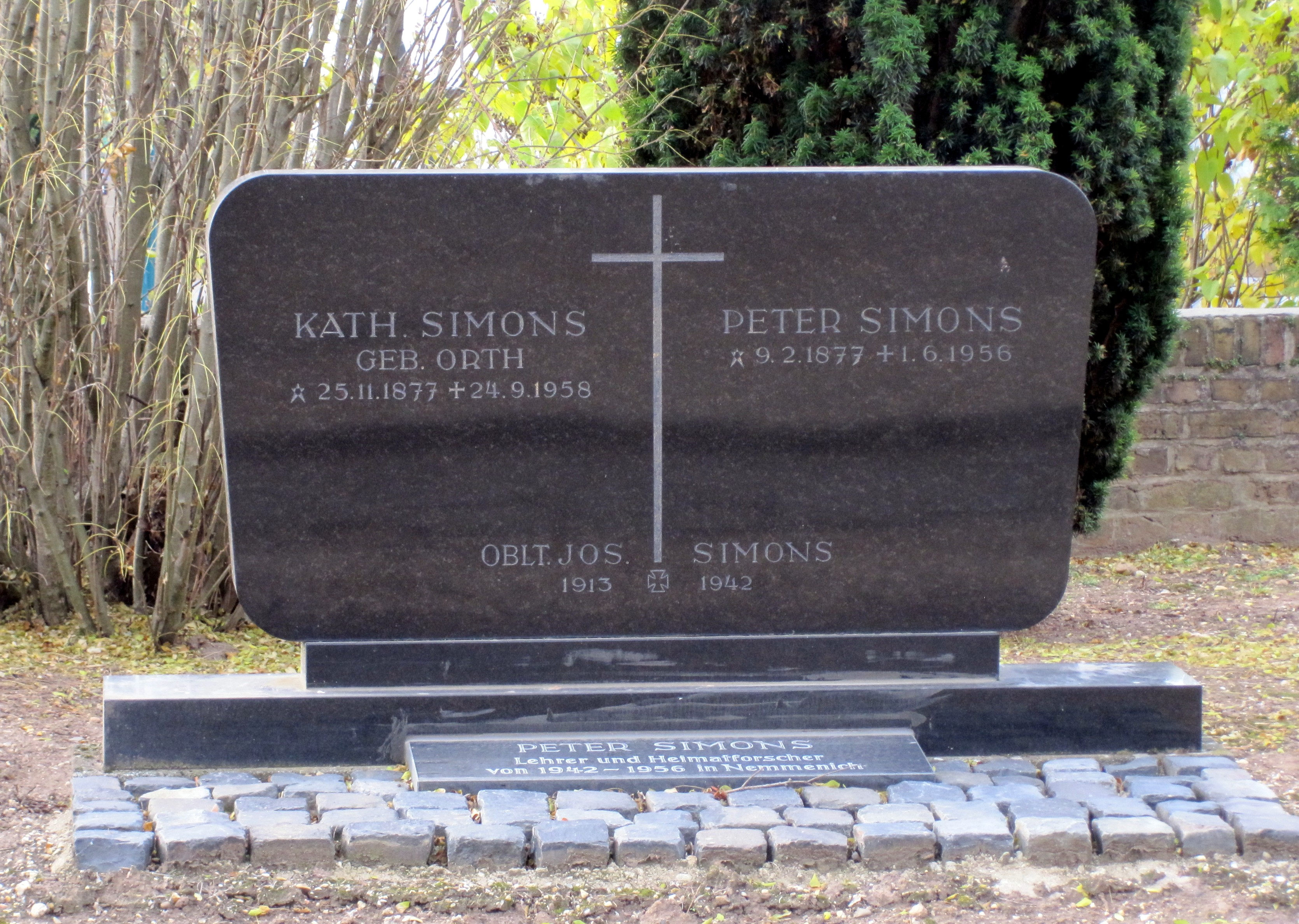 Familiengrab Peter Simons in Nemmenich (alter Teil des Friedhofes in Lüssem)